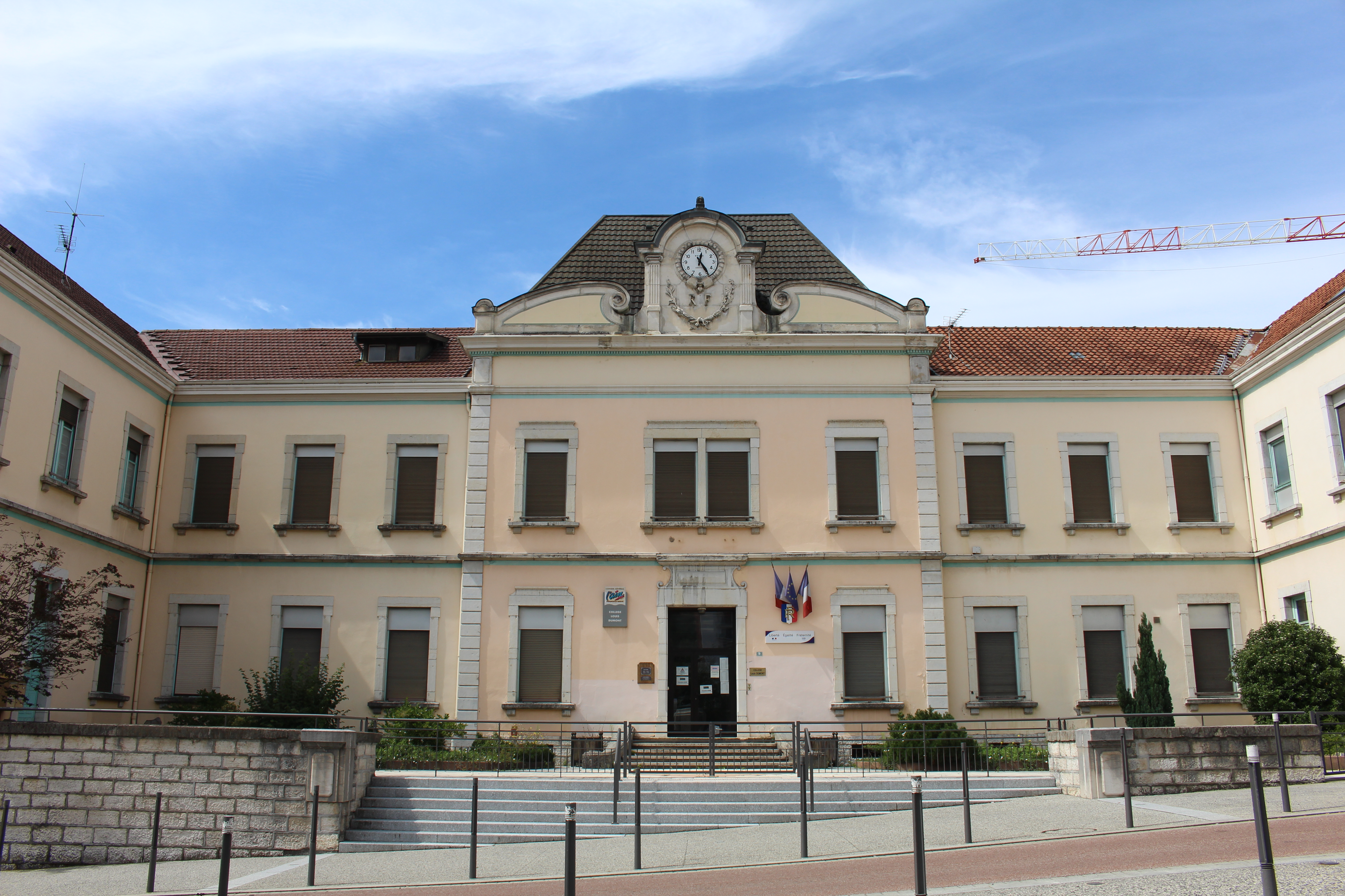 Collège Louis-Dumont de Bellegarde-sur-Valserine, Valserhône.